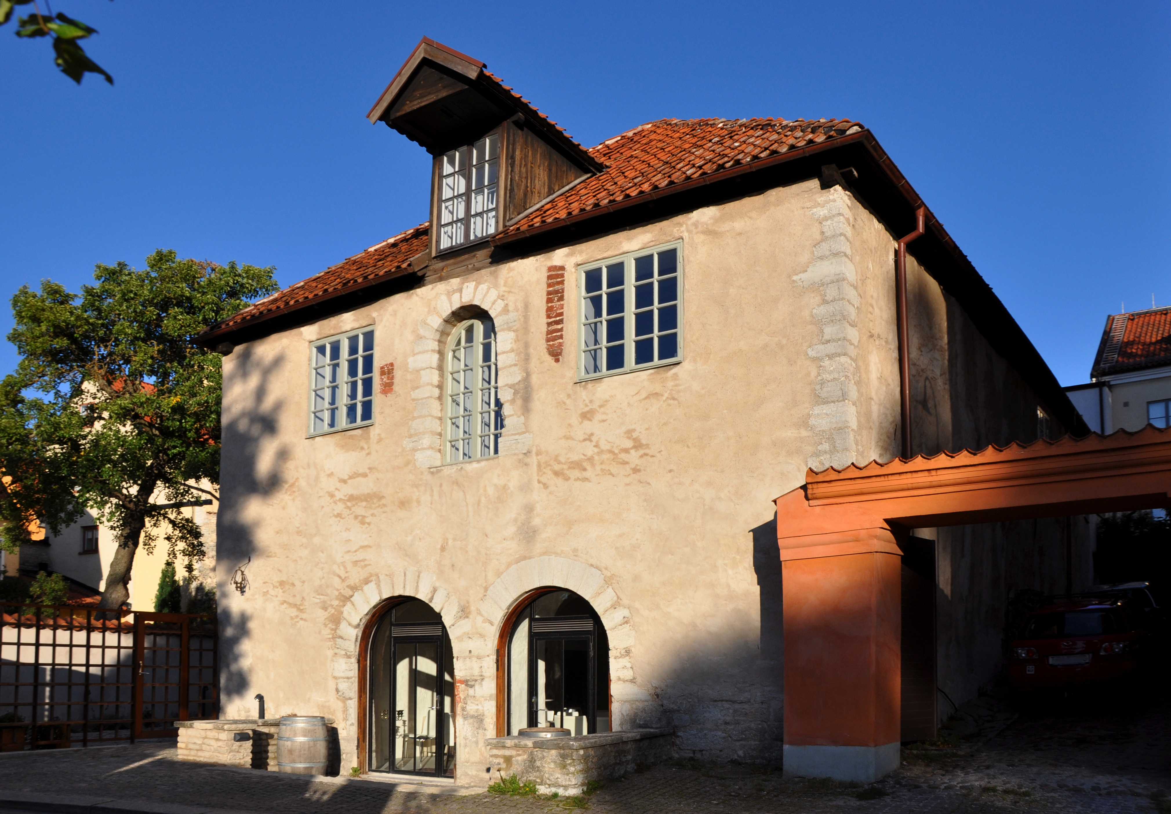 Medeltida packhus på Strandgatan i Visby. BBR Anläggnings-ID:21300000013999